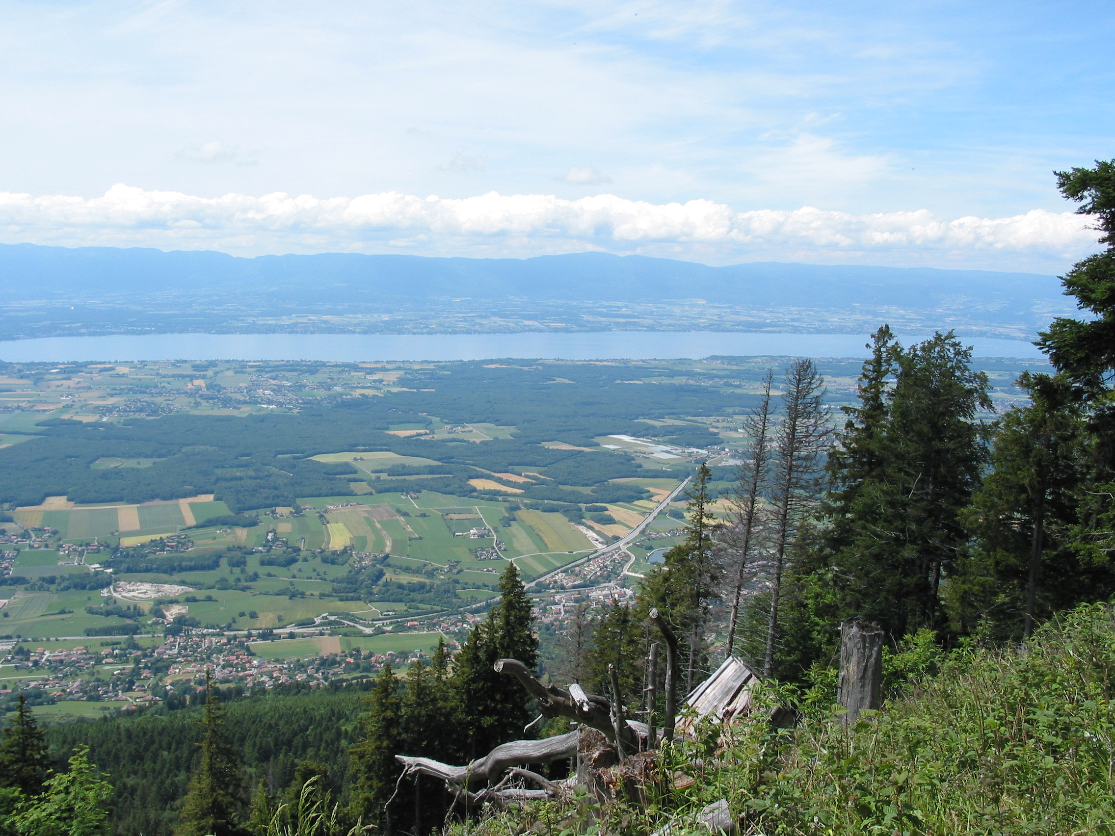 74140 Saint-Cergues, France